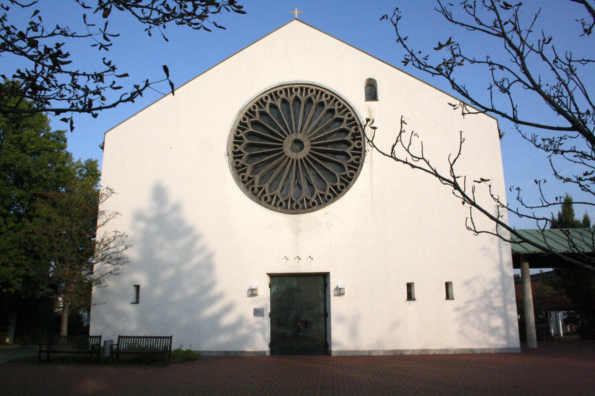 St Klara in München, Westfassade